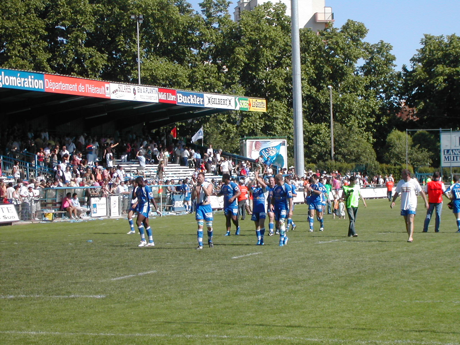 Montpellier. Tour d'honneur après l'ultime match de la saison